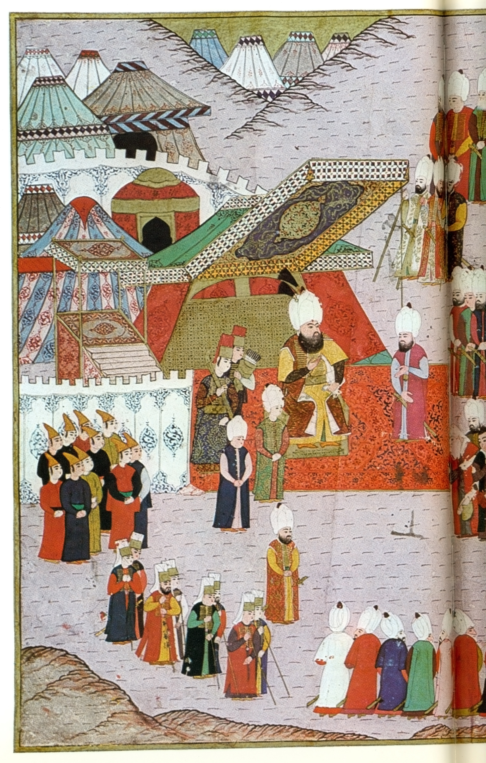 left part of a double size miniature